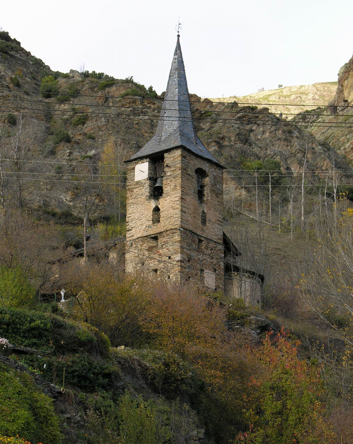 Campanar de Sant Llorenç d'Isavarre